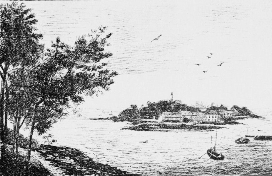 L'Île Tristan dans la baie de Douarnenez (dessin de 1912, J.Baudry, La Fontenelle le ligueur et le brigandage en Basse-Bretagne pendant la Ligue